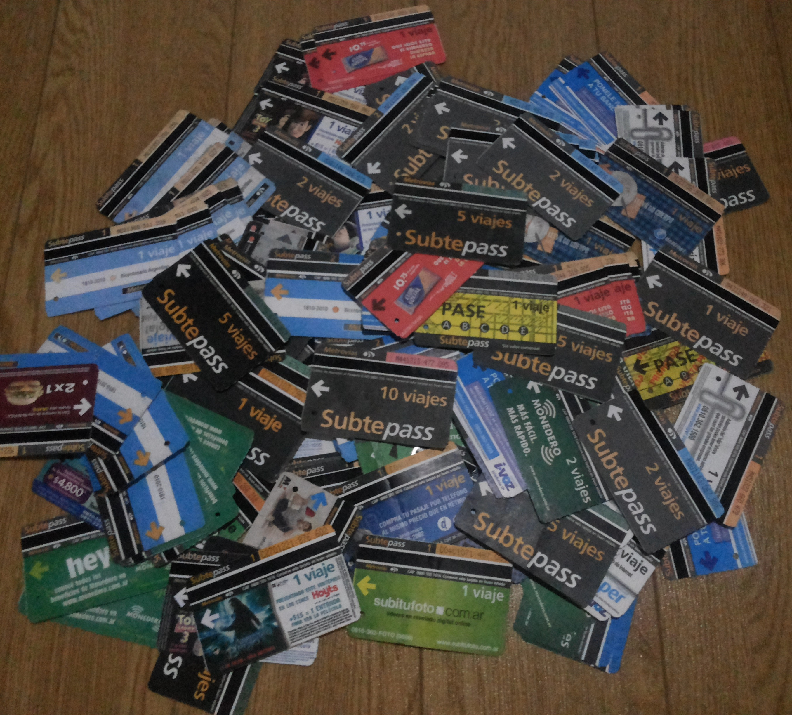 Colección Subtepass Buenos Aires Metro